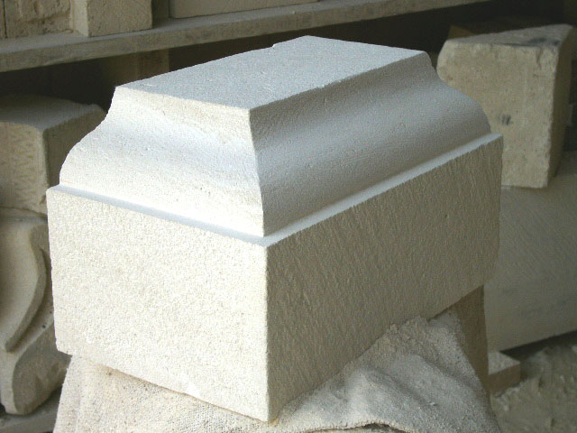 Un bloc de calcaire taillé. Photographie par So Leblanc.